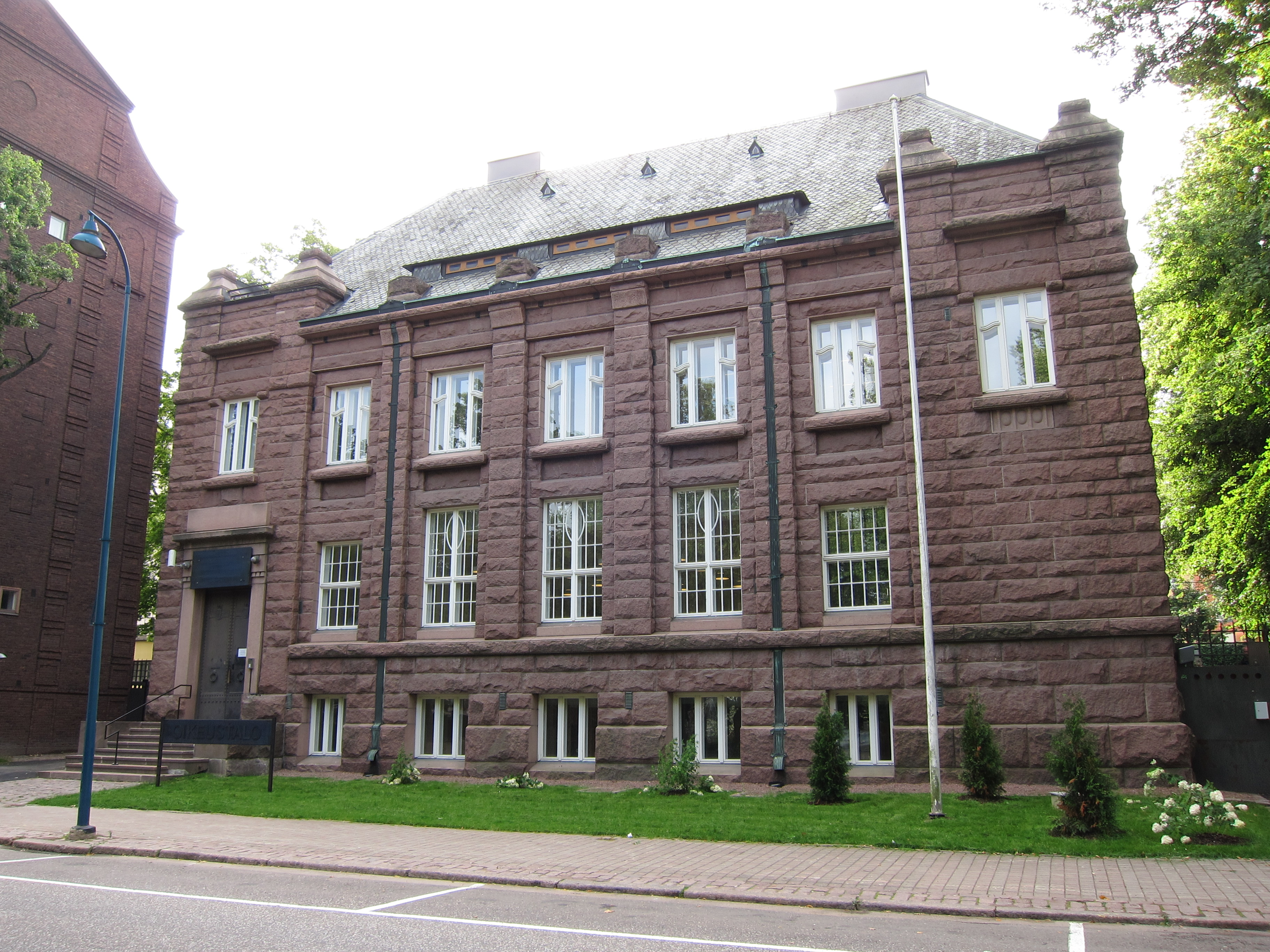 Kymenlaakson käräjäoikeuden Kotkan kanslia, entinen Suomen Pankin talo Kotkassa. Suunnitellut Gustaf Nyström (1909).